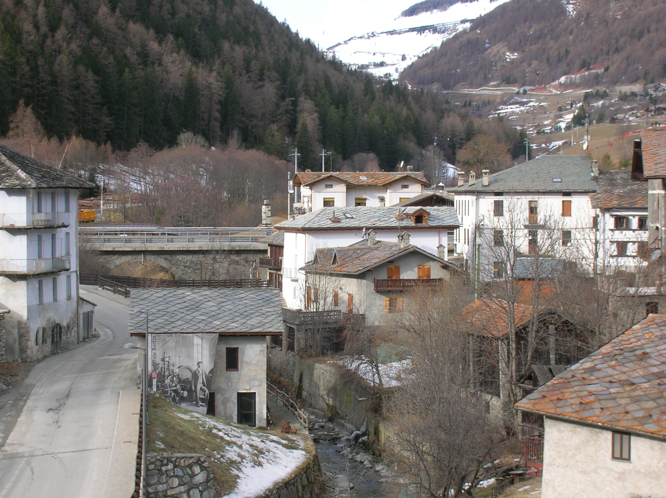 Etroubles, Valle d'Aosta, Italia.